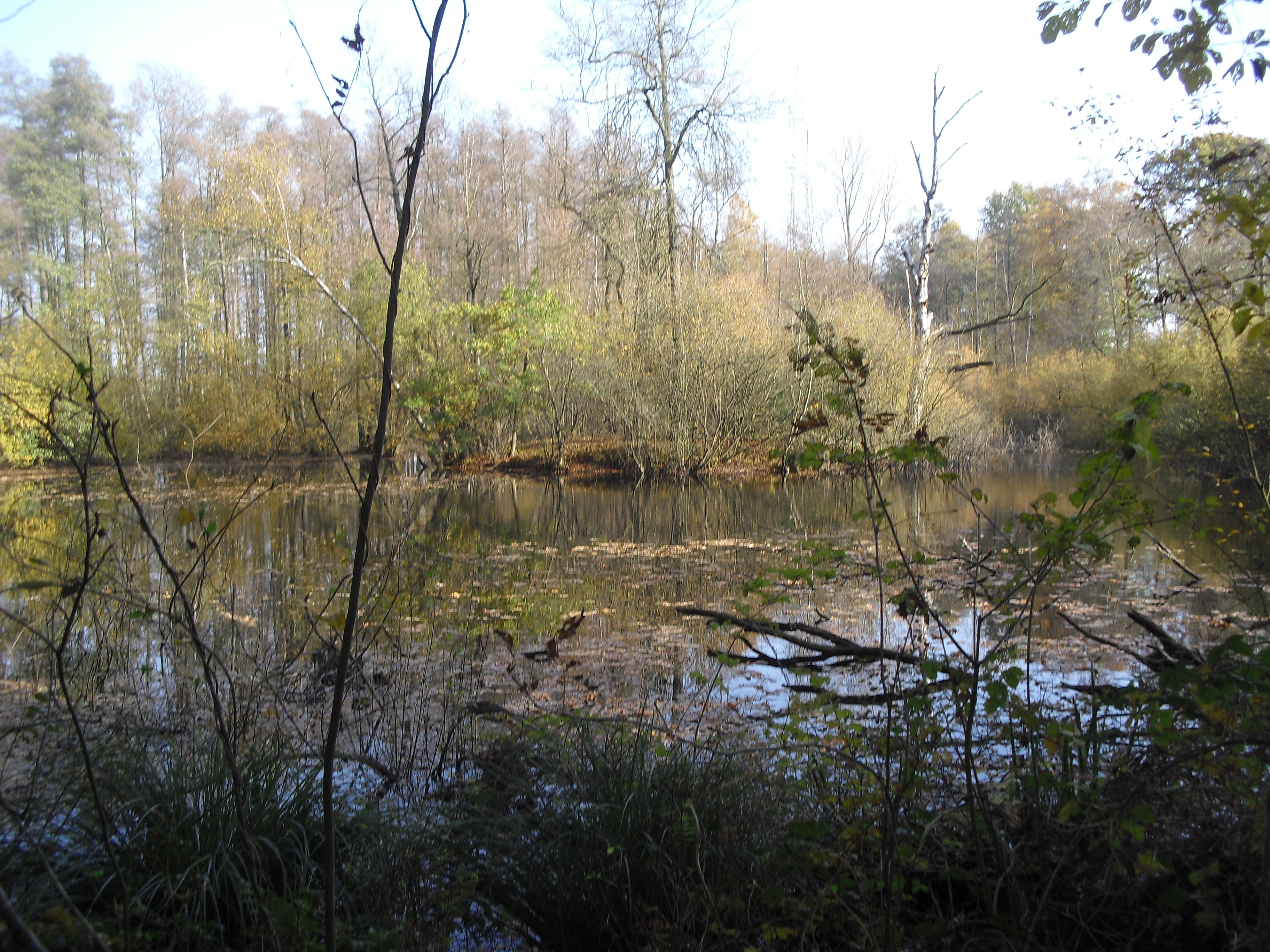 Heideweiher Apels Teich in Klausheide